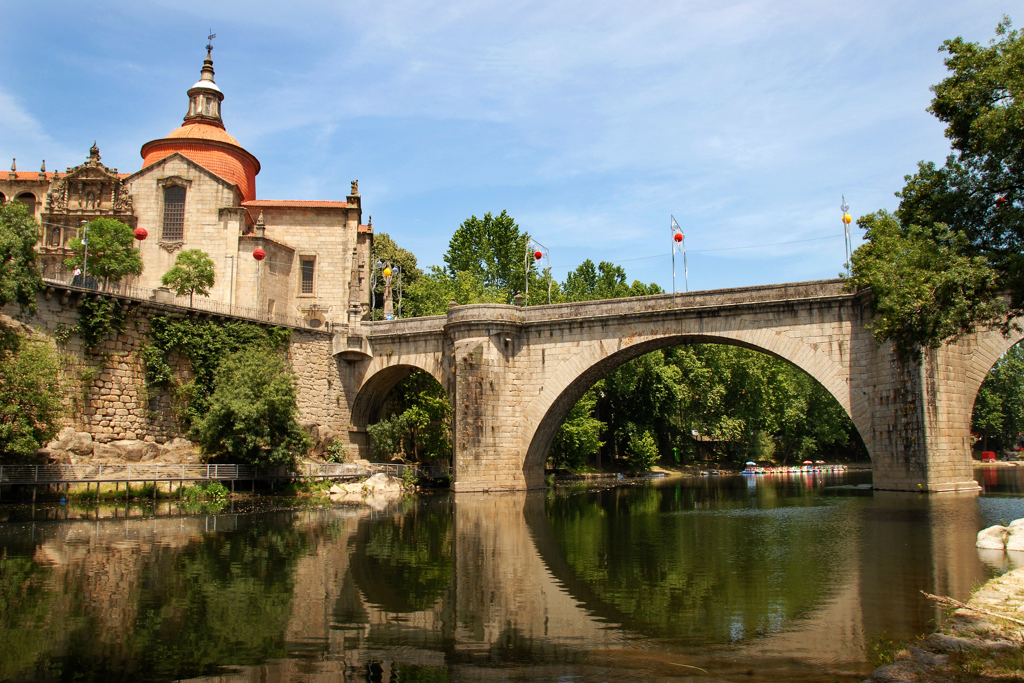 Amarante-Ponte sobre o Tâmega This file was uploaded for Wiki Loves Monuments in Portugal with the unique identifier 70622.